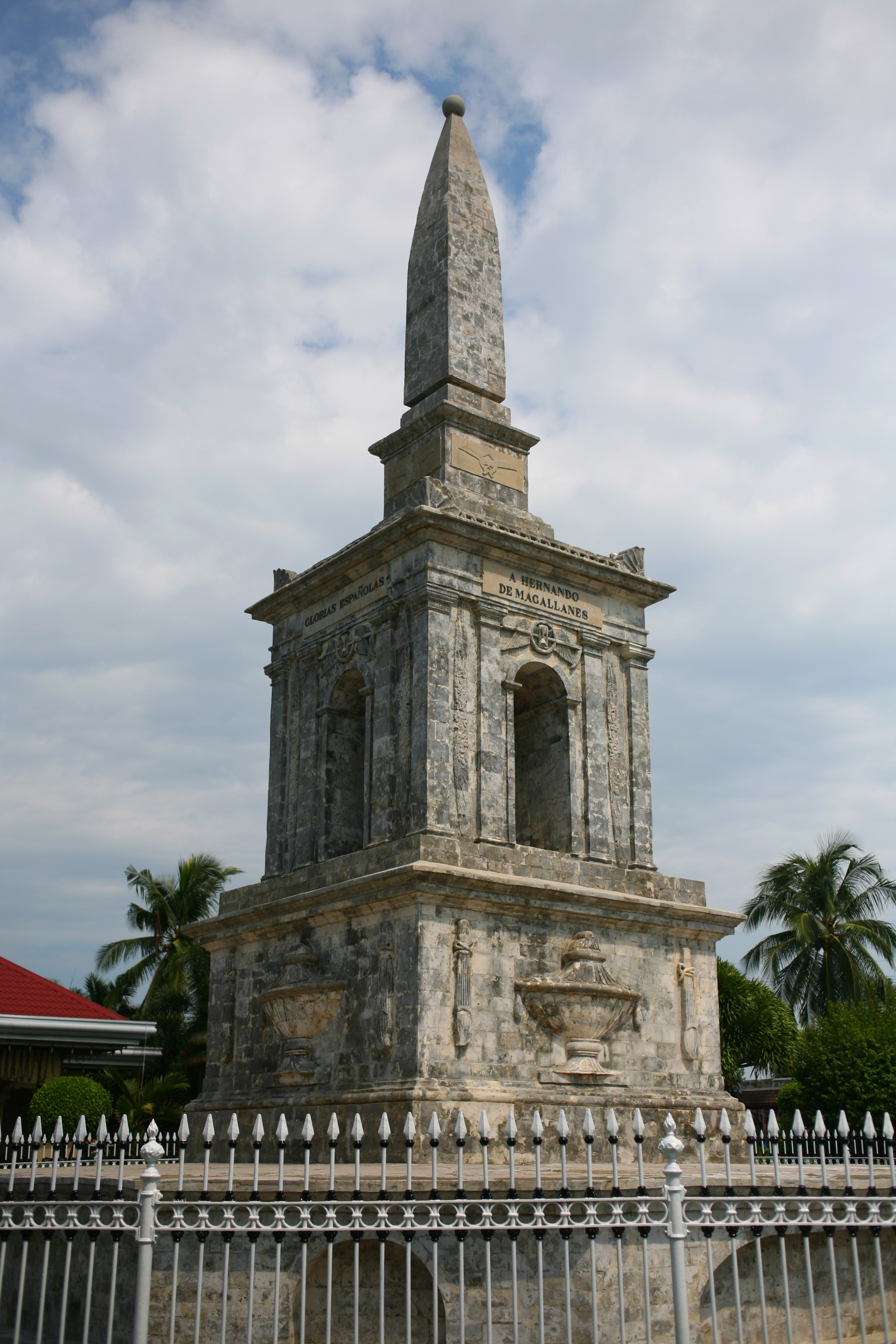 Il monumento eretto in onore di Ferdinando Magellano a Mactan nel 1866